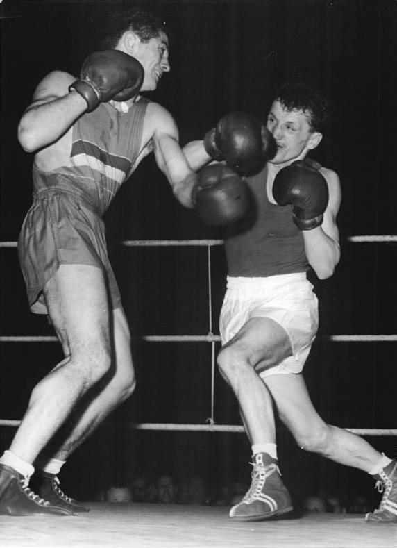 Babiasch, Ciuca Zentralbild Wendorf 31.3.1962 Boxländerkampf DDR-Rumänien am 30.3.1962 in der Berliner Werner-Seelenbinder-Halle. UBz: Im Fliegengewicht siegte Babiasch (rechts) gegen den Rumänen Ciuca.